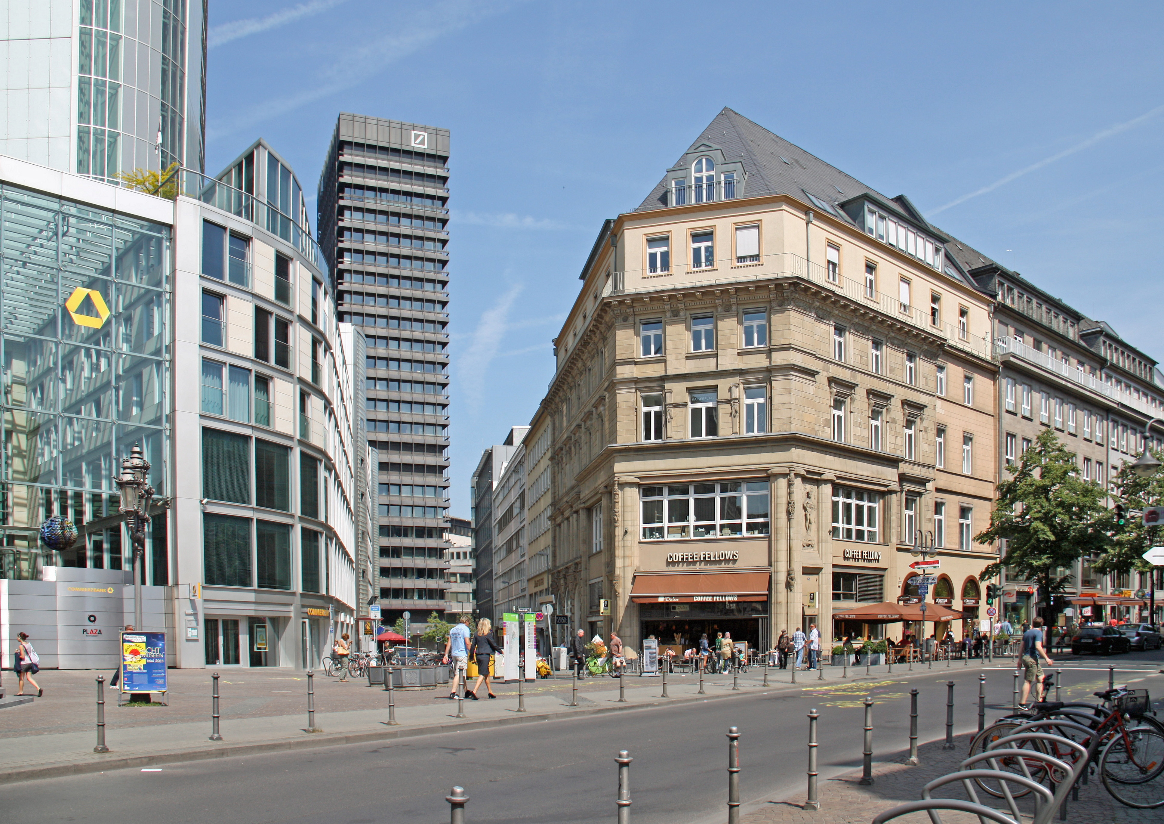 Der Kaiserplatz in Frankfurt. Auf der linken Seite befindet sich der Haupteingang des Commerzbank-Hochhauses.